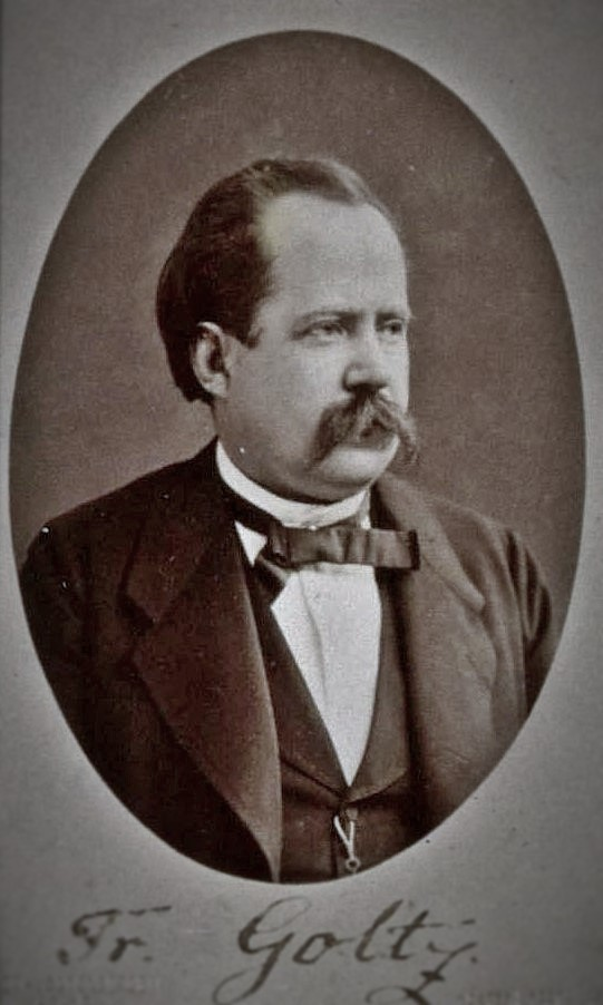 Titre : Goltz Friedrich Leopold, med Éditeur : Kaiser-Wilhelms-Universitaet (Strasbourg) Date d'édition : 1872 Sujet : Strasbourg Sujet : PORTRAIT, Goltz (Friedrich Leopold) Type : image fixe Langue : Allemand Format : 32 x 28 cm ; 8,5 x 5,5 cm Format : image/jpeg Droits : domaine public Identifiant : ark:/12148/btv1b10227091d Source : Bibliothèque nationale et universitaire de Strasbourg, NIM02478 Relation : Description : Appartient à l’ensemble documentaire : BNUStr003 Provenance : bnf.fr Date de mise en ligne : 23/09/2013